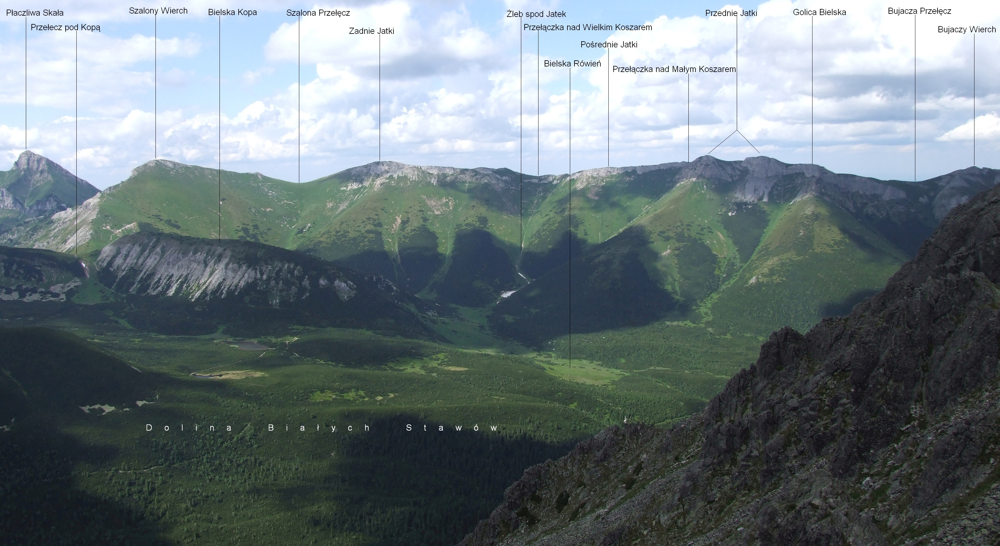 Tatry Bielskie